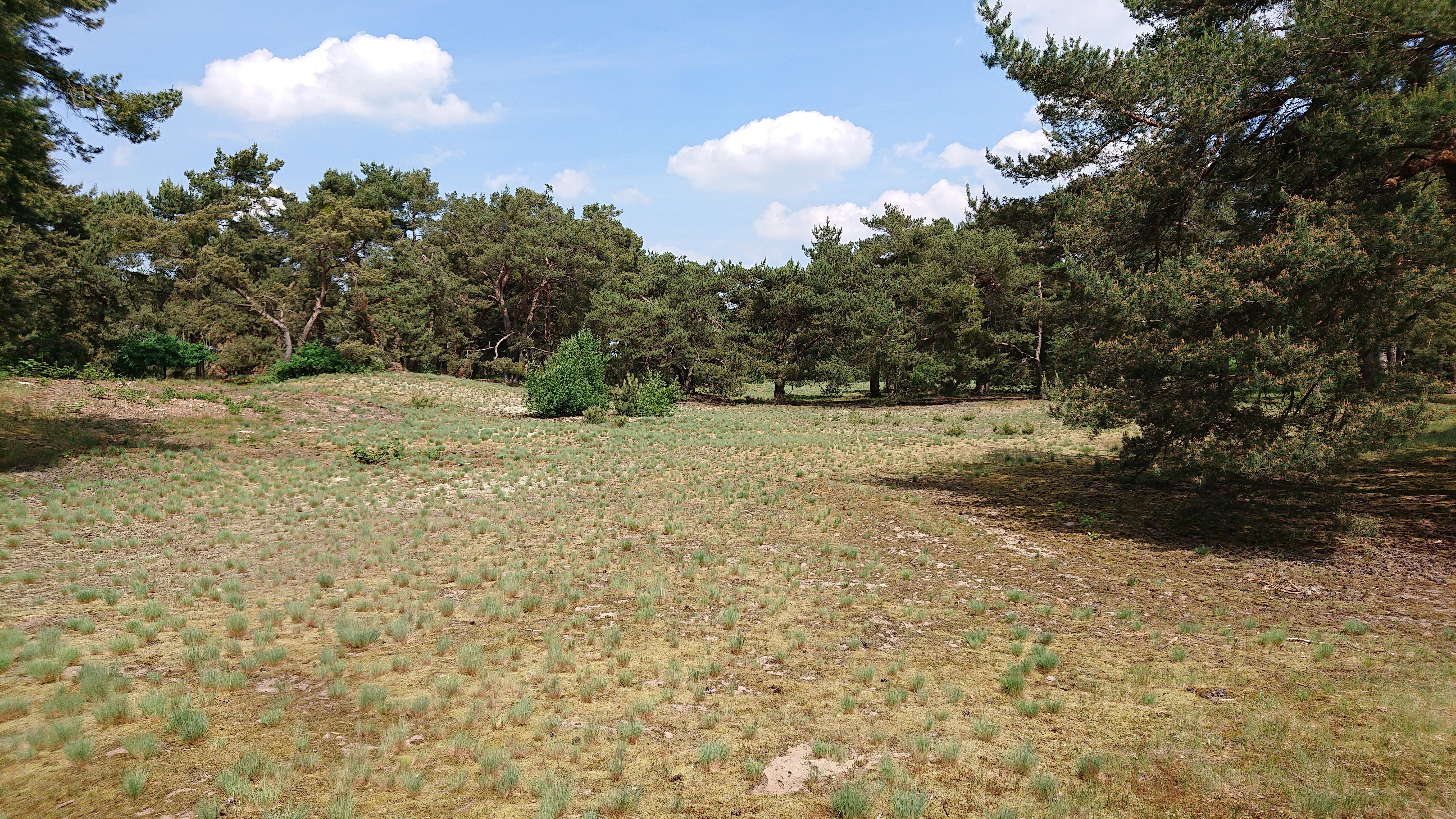 Blick vom Steg in die Düne